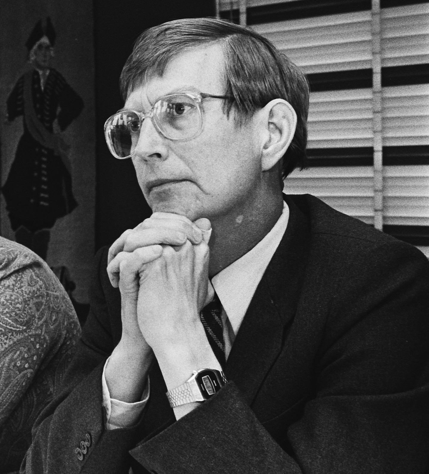 Burgemeester Barend Ferman tijdens persconferentie n.a.v. ontploffing kruitfabriek in Muiden